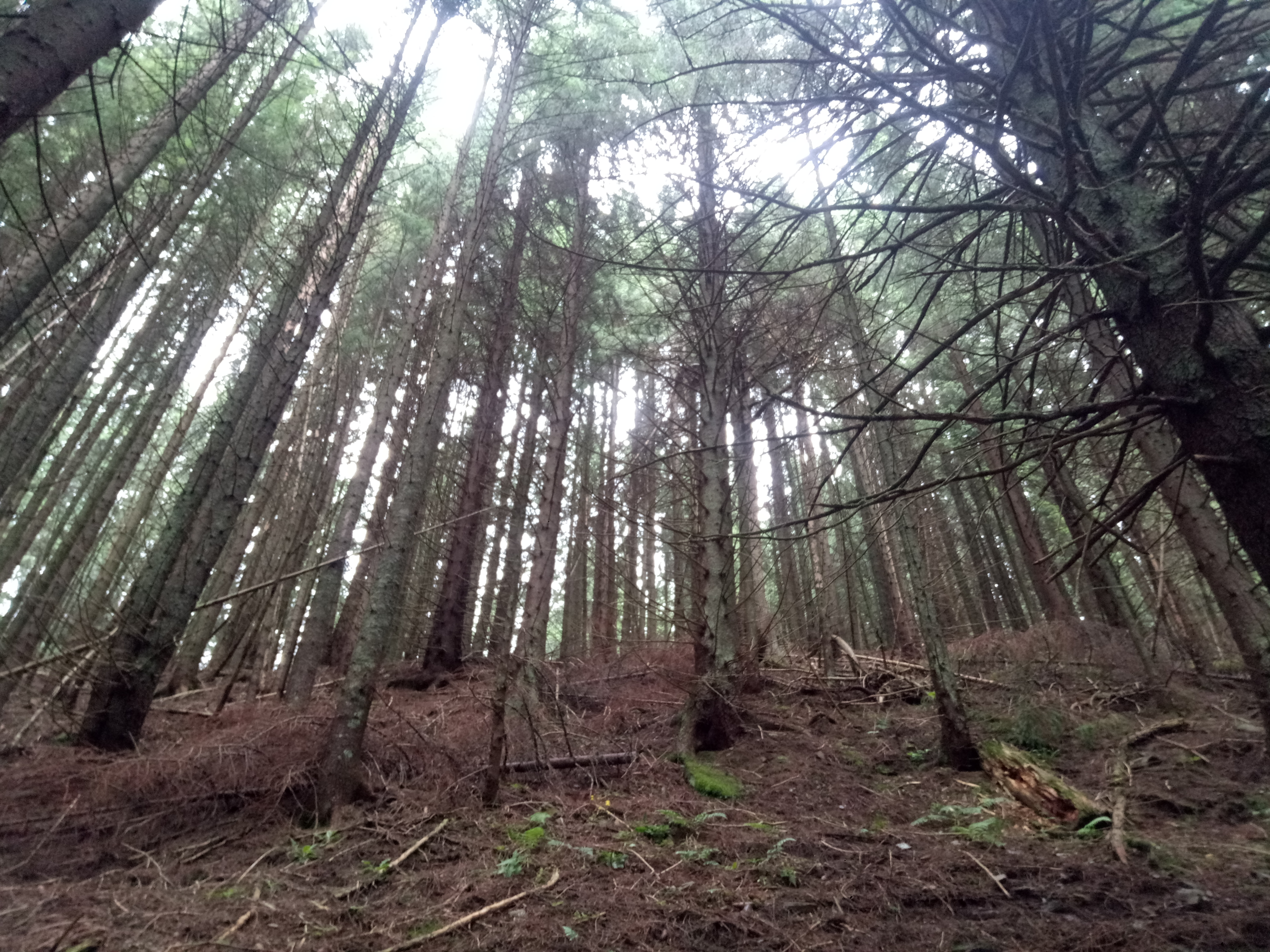 г. Костриця